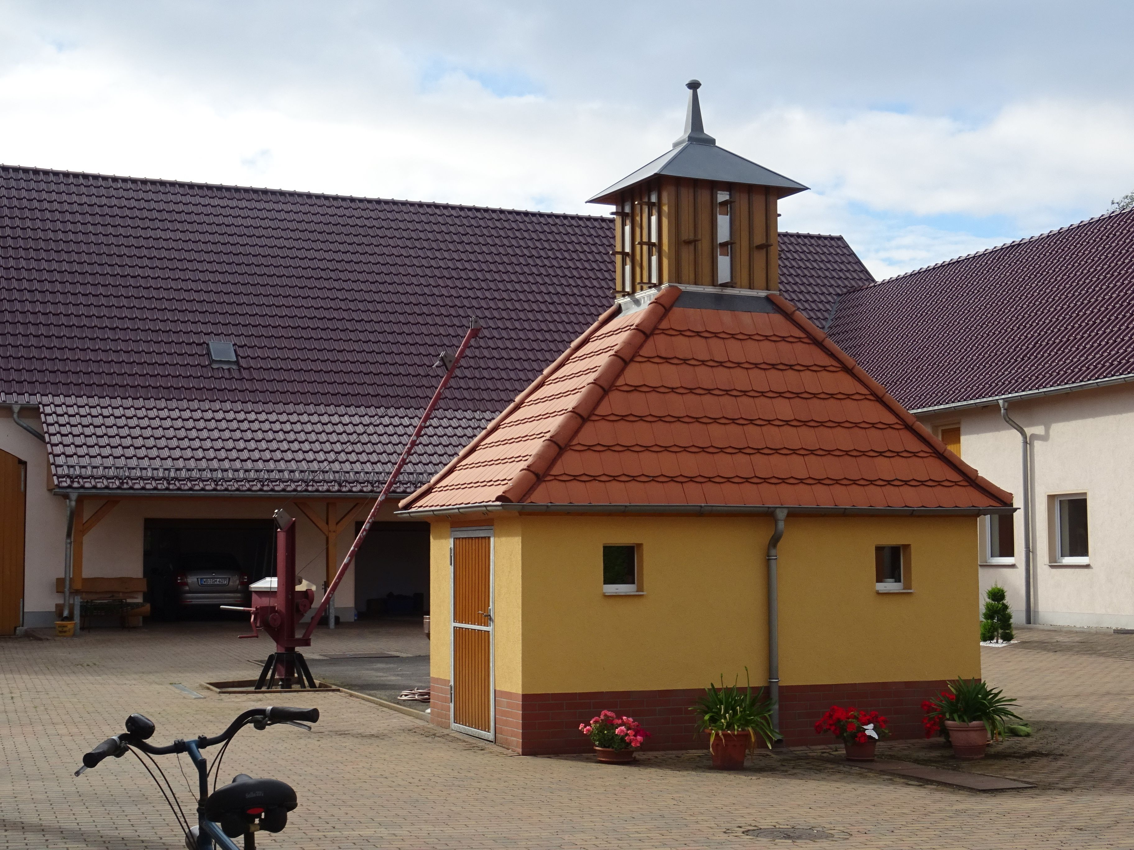 denkmalgeschütztes Taubenhaus in Labrun, Stadt Annaburg